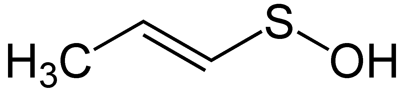 Strukturformel von 1-Propensulfensäure